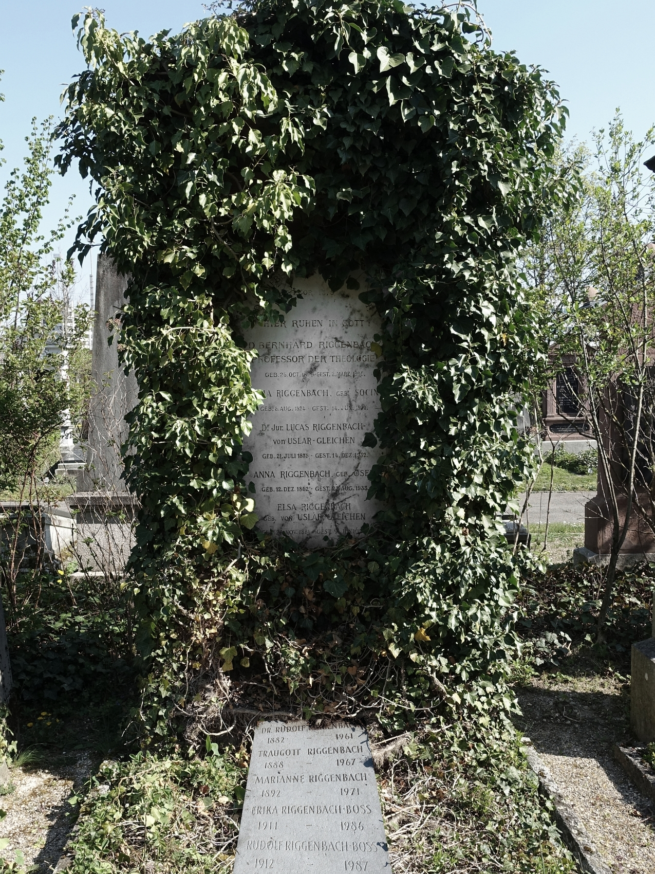 Familiengrab. Riggenbach-Socin-von Uslar-Gleichen-Oser-Boss. Friedhof Wolfgottesacker Basel.